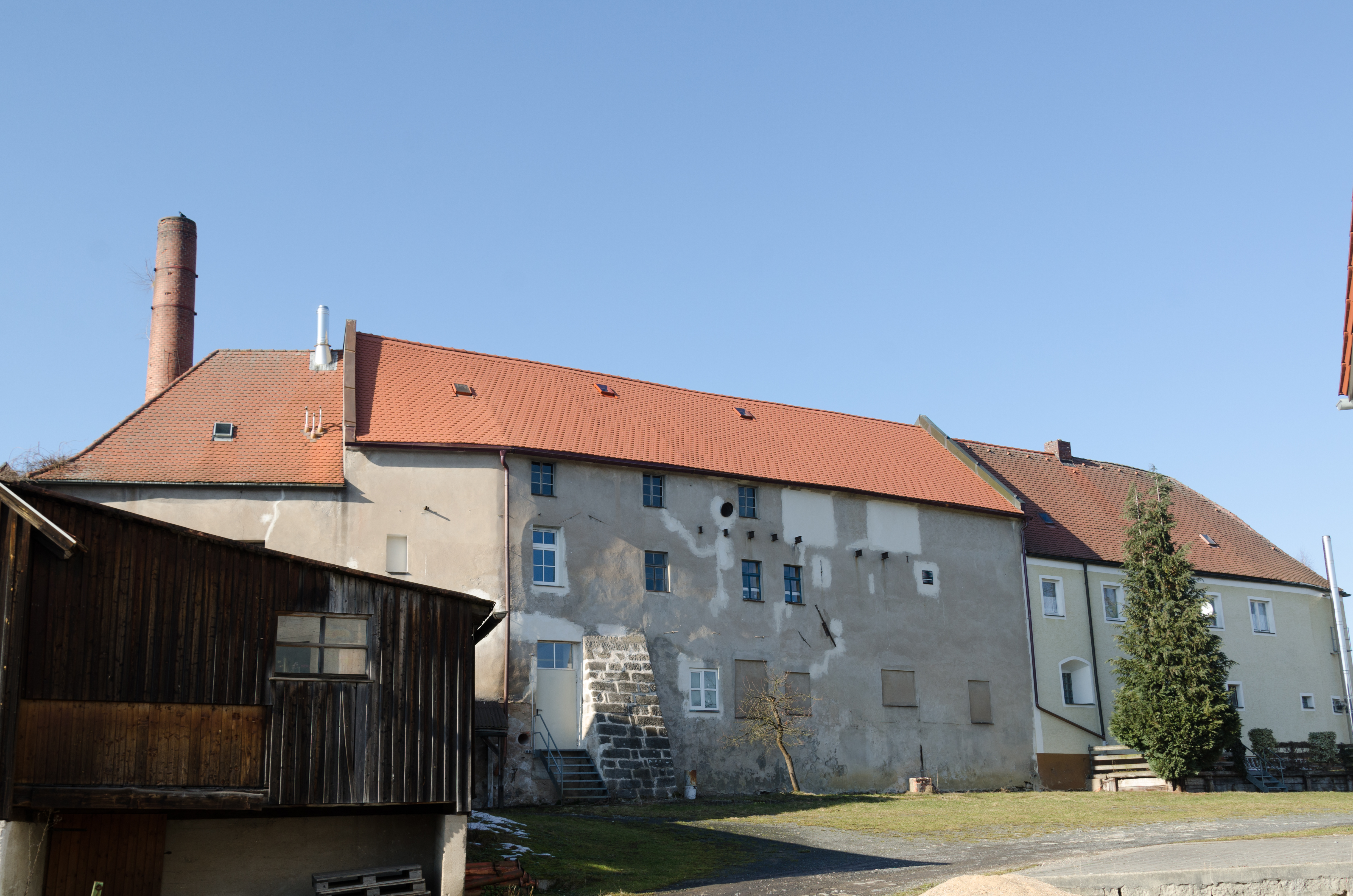 Kemnath, Klosterhofstraße 6